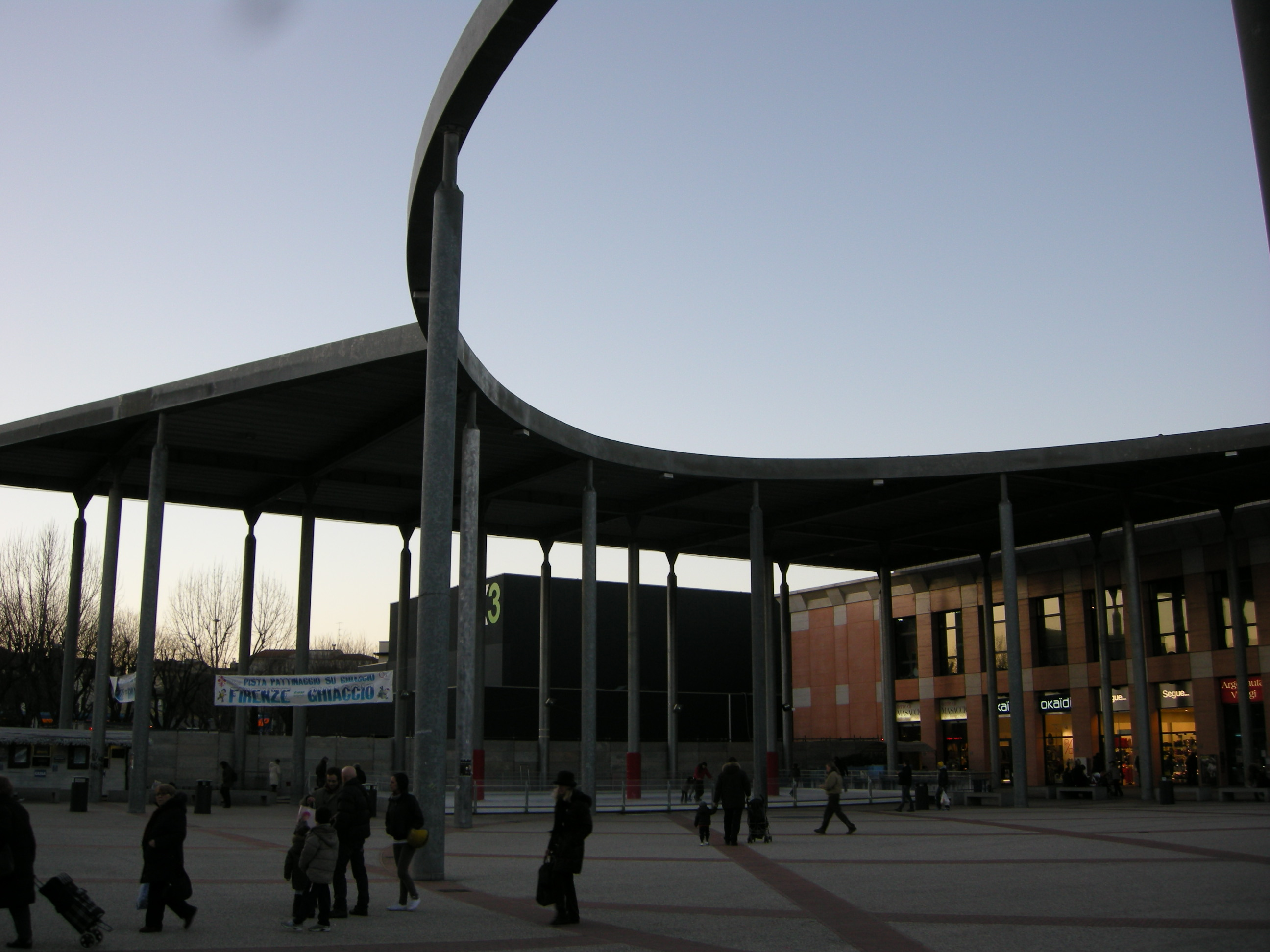 Coop gavinana firenze